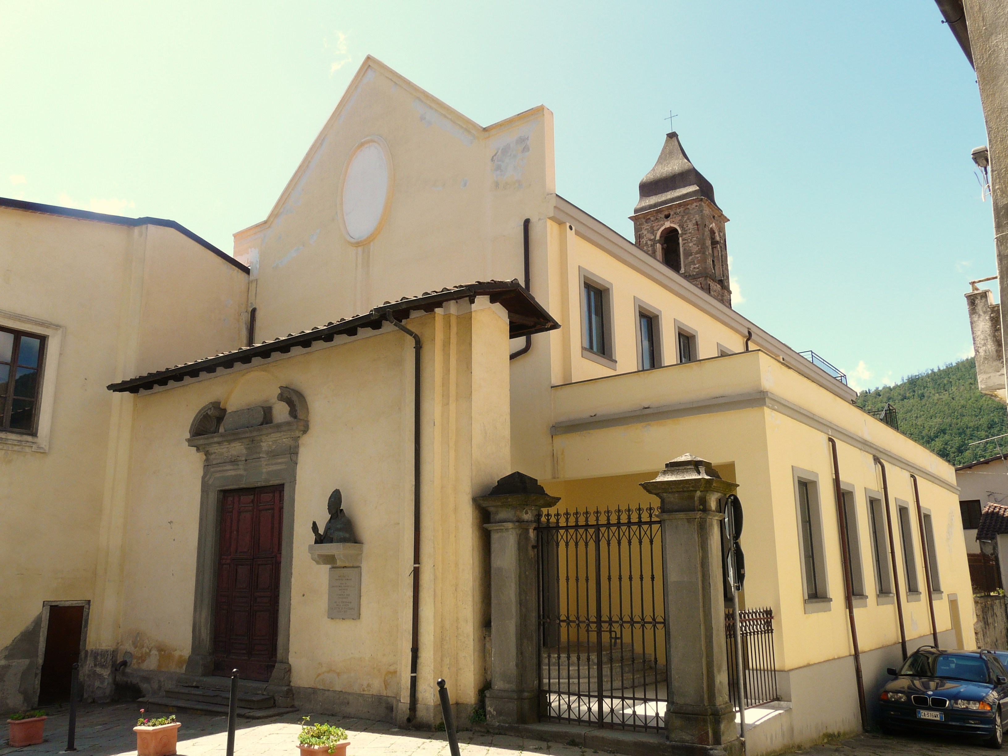 Ostello di Fivizzano, Toscana, Italia